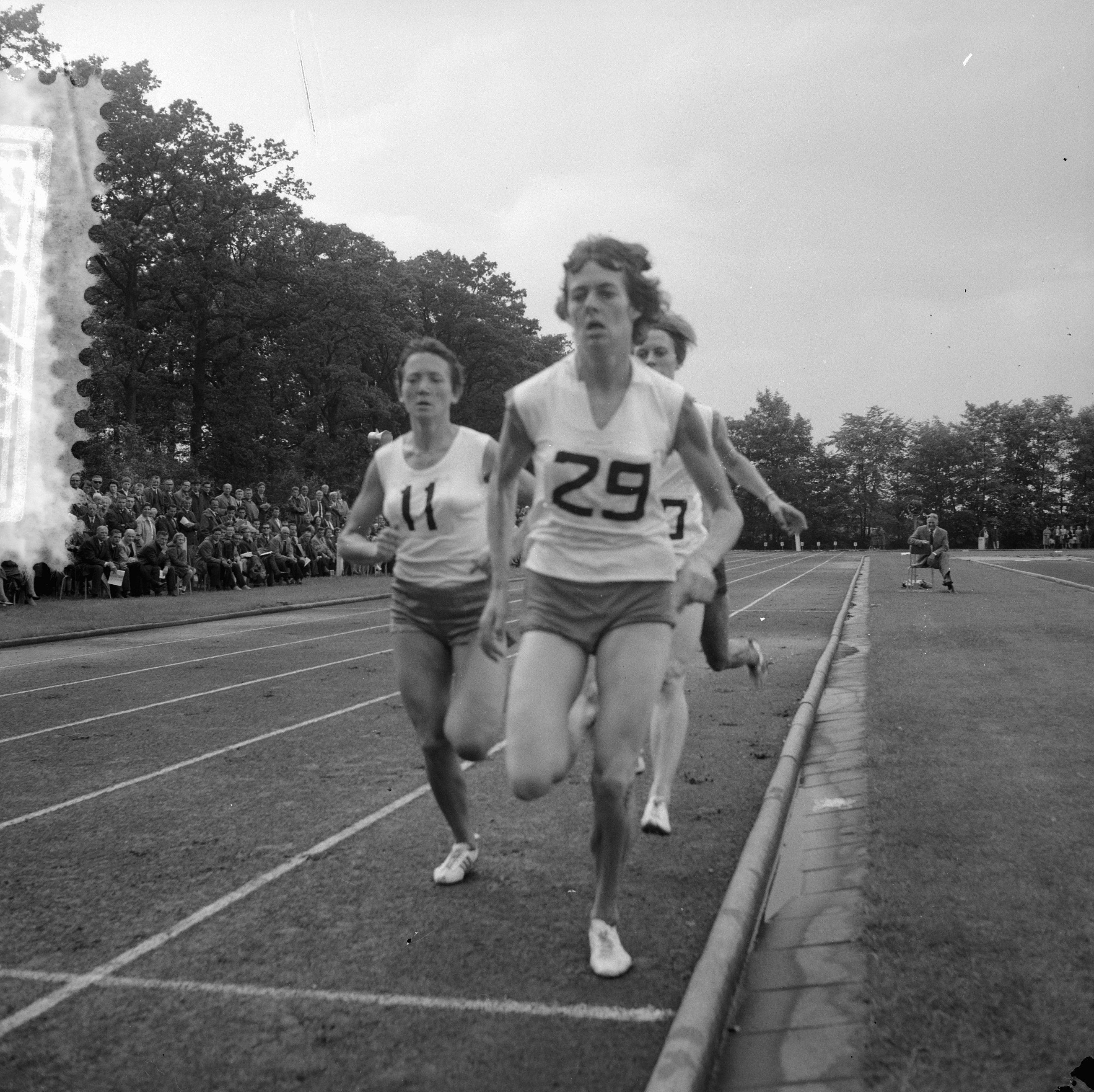 Collectie / Archief : Fotocollectie Anefo Reportage / Serie : [ onbekend ] Beschrijving : Atletiek Nederland tegen Polen dames, G. Kraan tegen Nowakowska Datum : 9 augustus 1964 Locatie : Nederland, Polen Trefwoorden : ATLETIEK Persoonsnaam : G. Kraan, Nowakowska Fotograaf : Broers, F.N. / Anefo Auteursrechthebbende : Nationaal Archief Materiaalsoort : Negatief (zwart/wit) Nummer archiefinventaris : bekijk toegang 2.24.01.03 Bestanddeelnummer : 916-7522